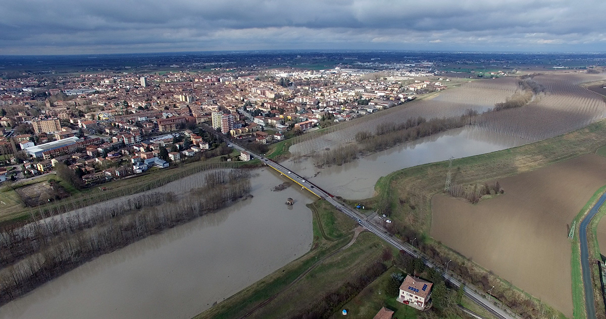 Passaggio della piena del Fiume Reno a Cento (fe)